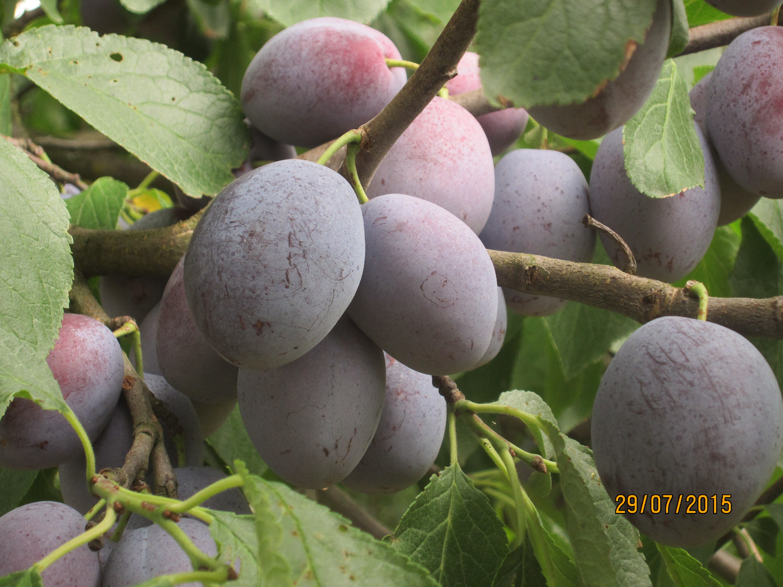 Katinka